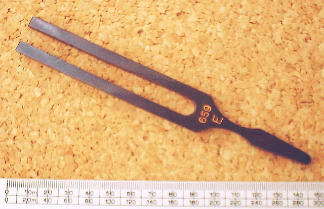 Diapasón afinado a 659Hz Tuning fork by John Walker showing note (E) and frequency in hertz (659); picture taken by me and released into the public domain